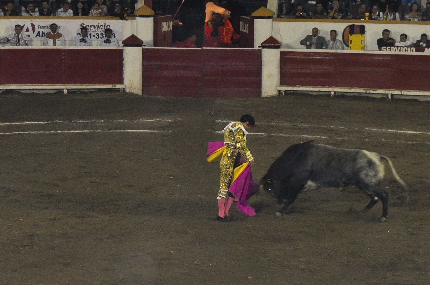 Puebla, Mexico